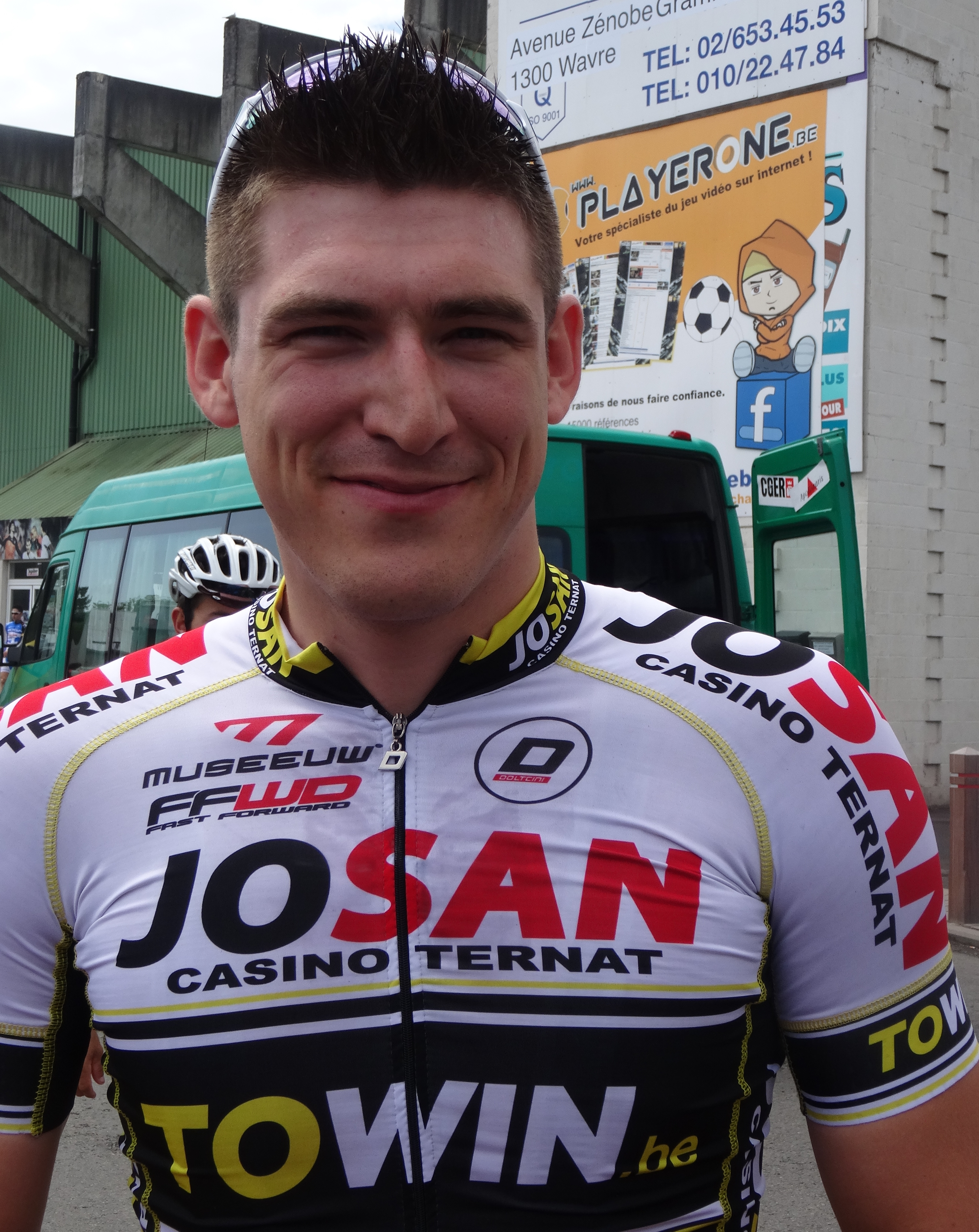 Reportage réalisé le dimanche 8 juin à l'occasion du départ du Mémorial Philippe Van Coningsloo 2014 à Wavre, Belgique.